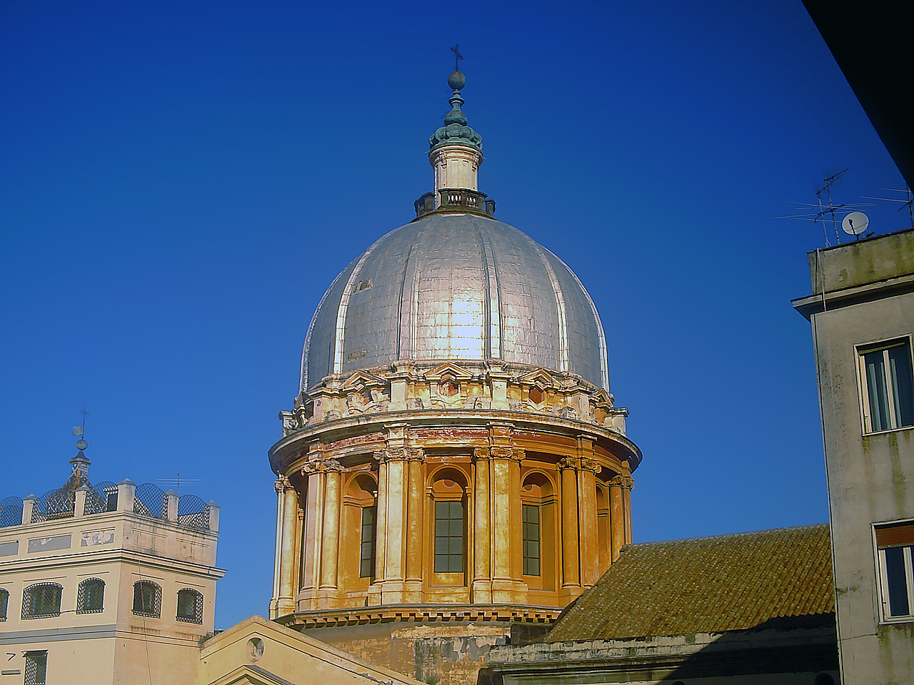 Cupola dell Basilica dello Spirito Santo